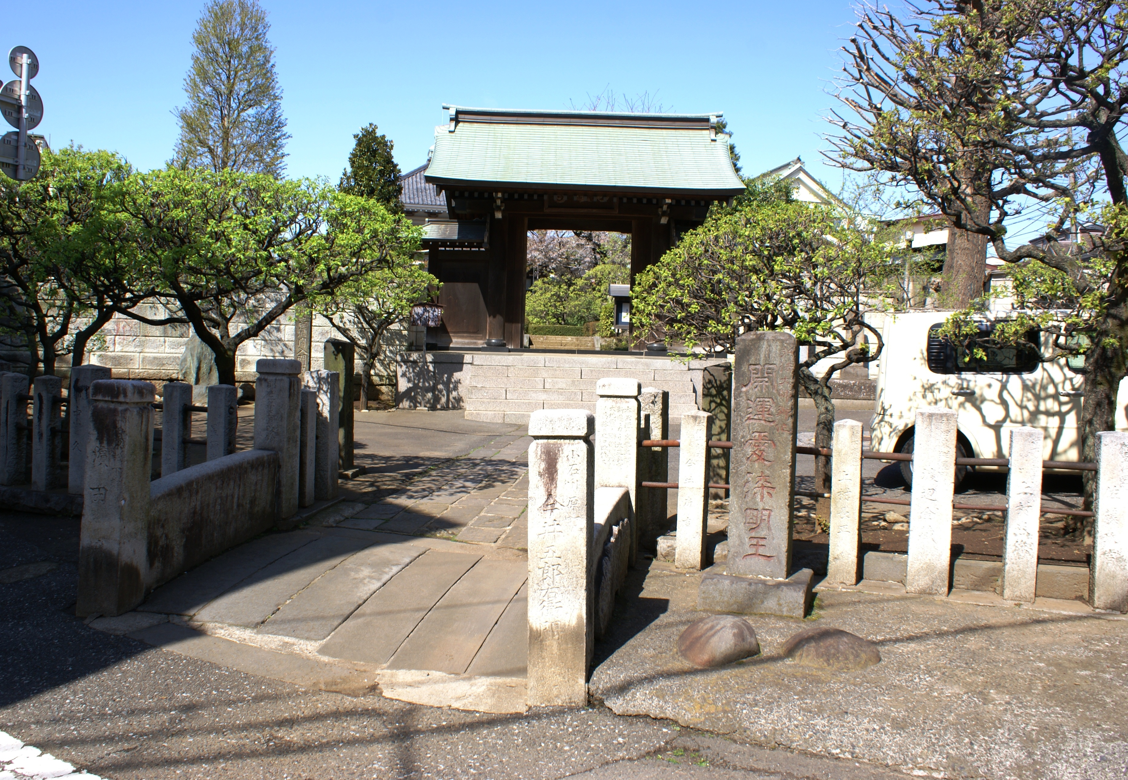 大和町日曜寺